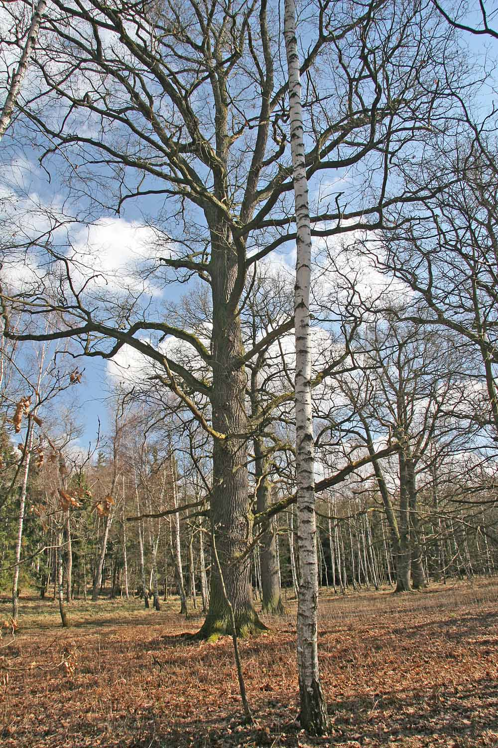 památné duby u rybníka Žid